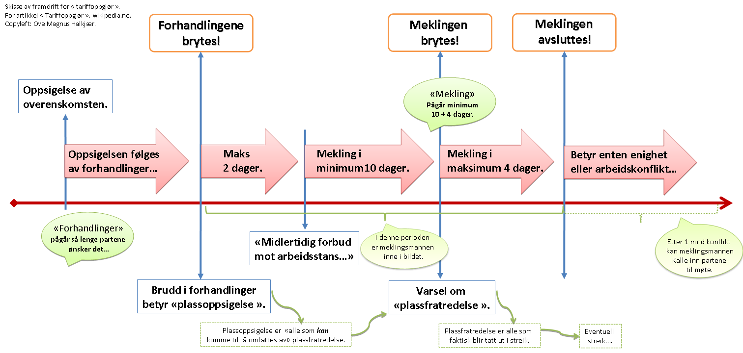 Illustrerer framdriften for et tariffoppgjør eller lønnsoppgjør for overenskomster eller tariffavtaler i privat sektor i Norge.